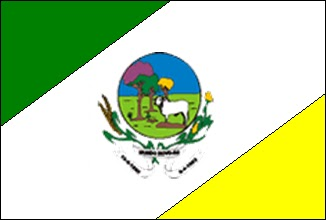 Bandeira do município de Mundo Novo, Goiás, Brasil